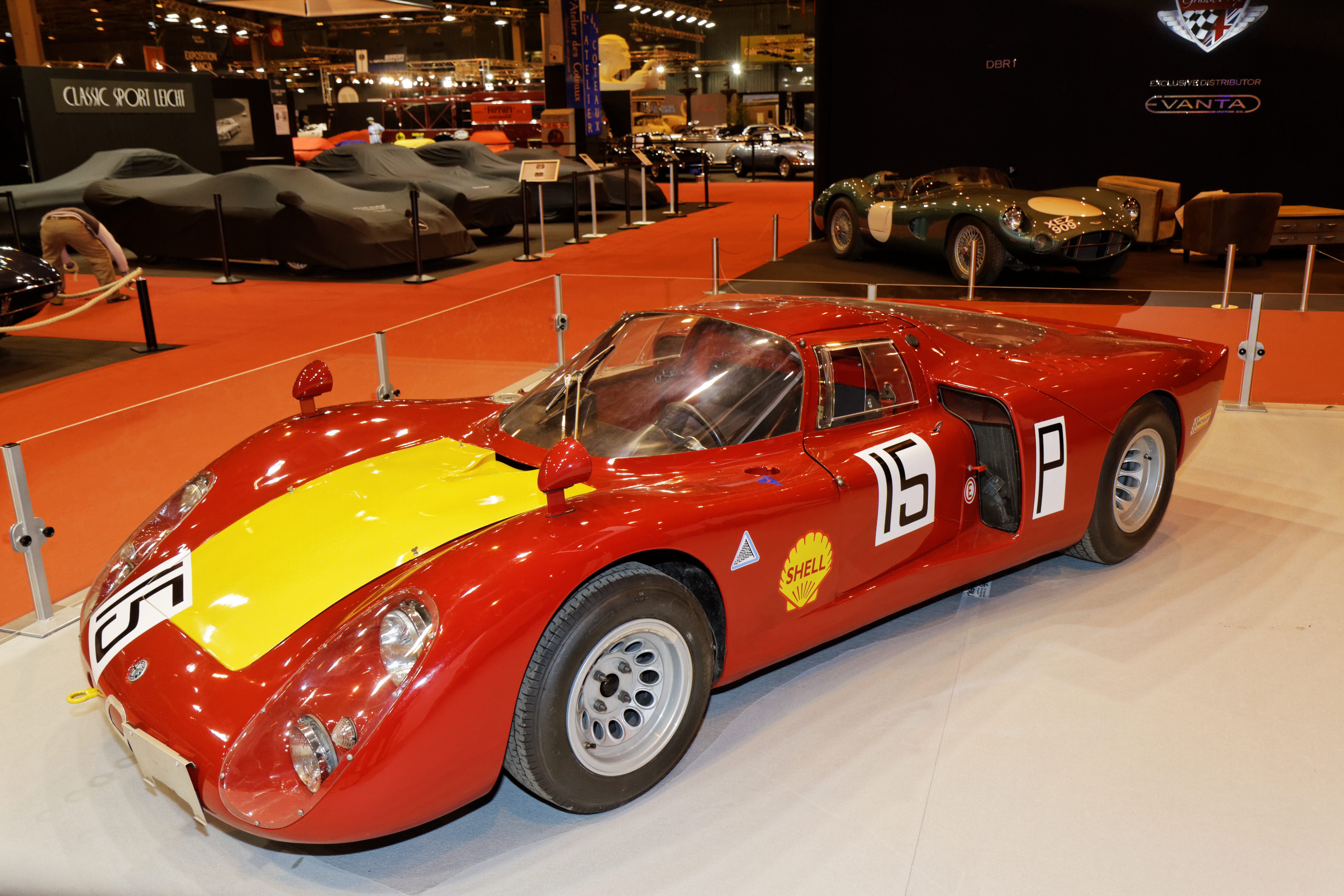 L'Alfa romeo Proto exposée lors du salon Retromobile 2014.